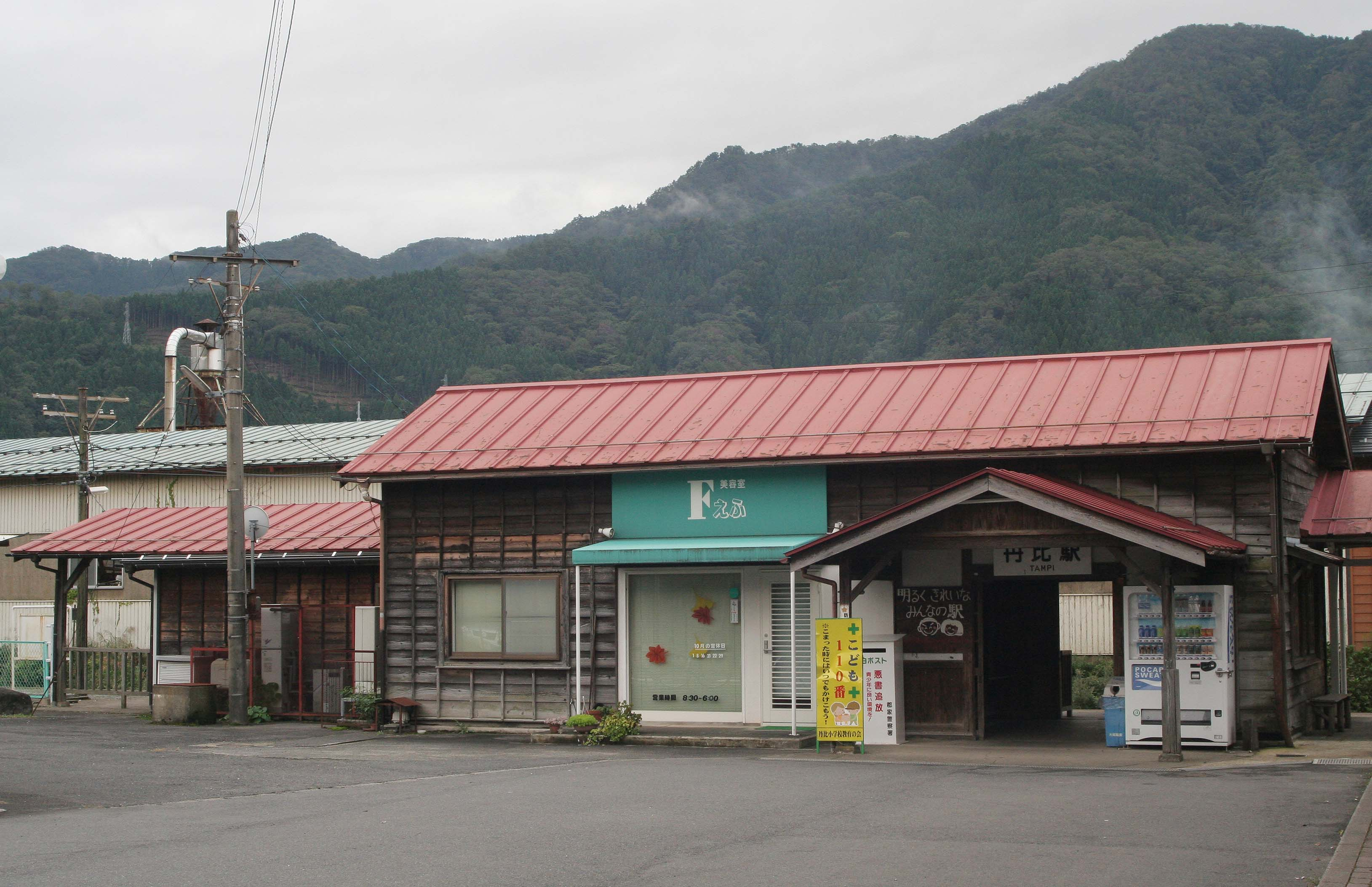 若桜鉄道 丹比駅の駅舎